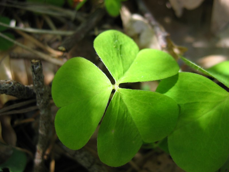 Blatt des Wald-Sauerklees Oxalis acetosella